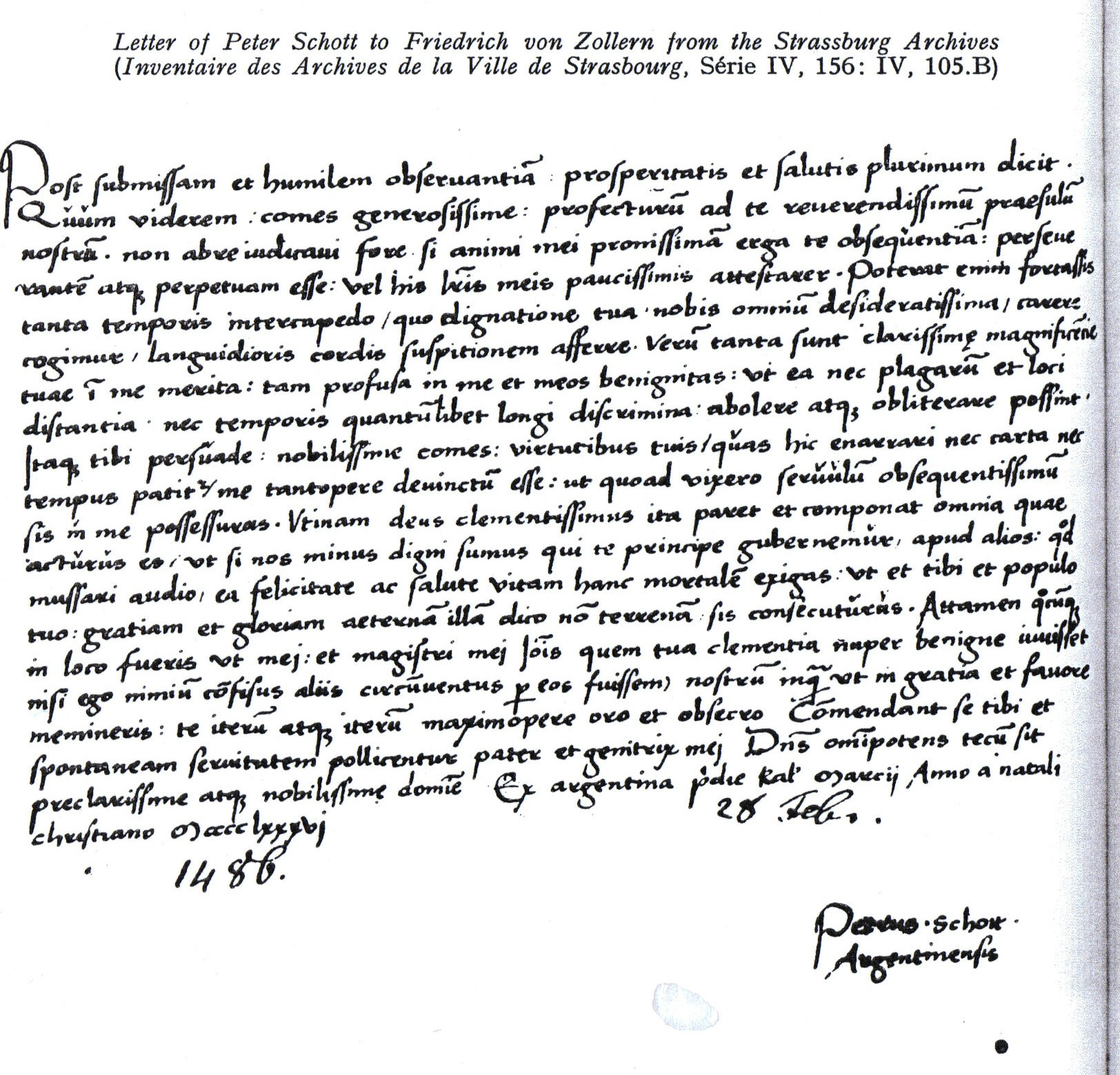 Lateinischer Brief (autograph) von Peter Schott dem Jüngeren an Bischof Friedrich von Zollern, Straßburg 28. Februar 1486, Stadtarchiv Straßburg IV, 105B